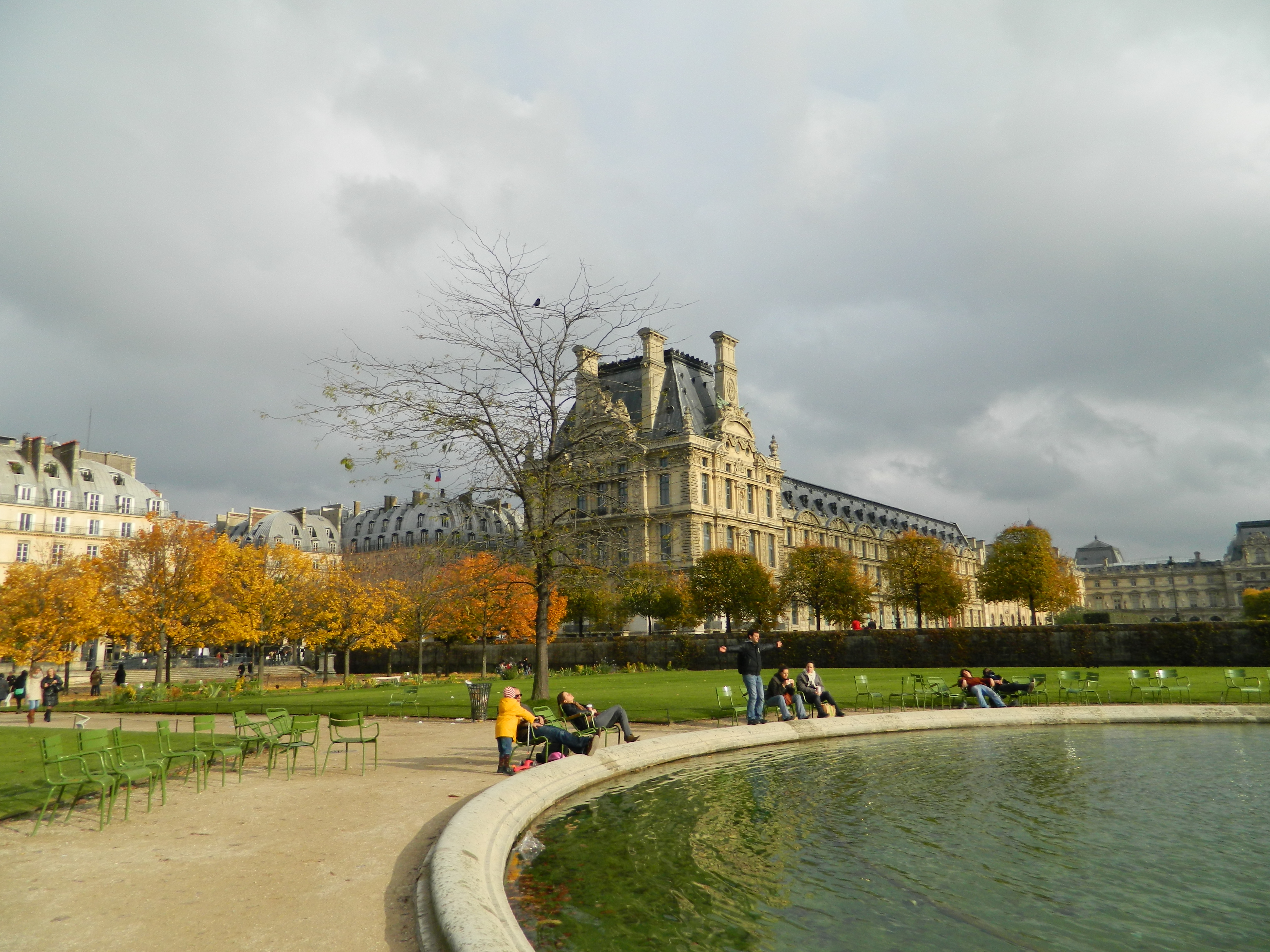 Grand bassin rond du Jardin des Tuileries, Ier arrondissement, Paris, France.